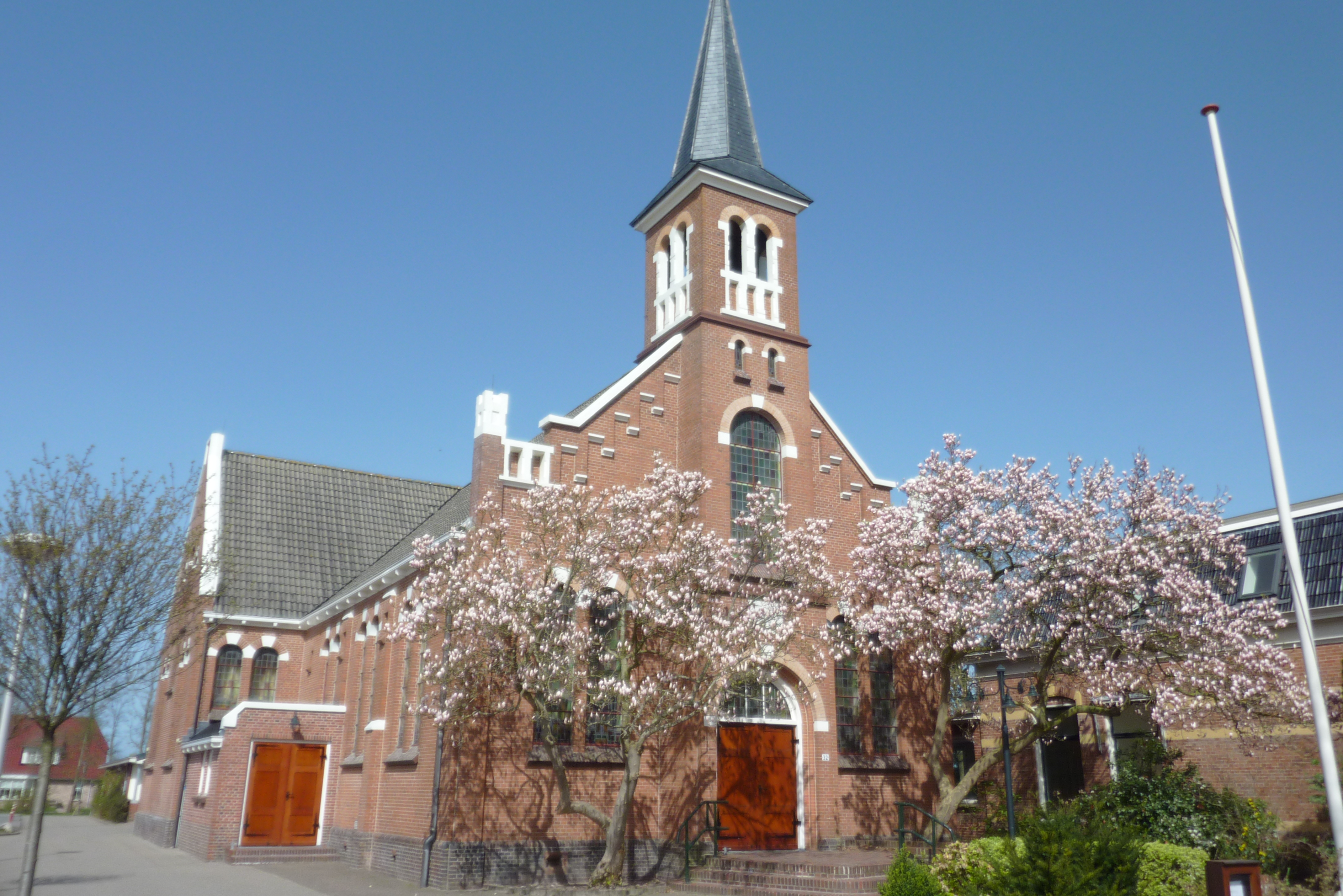 Schildwolde: Geref. Kerk (Vrijgemaakt), Hoofdweg 32 (1911-'12, Ytzen van der Veen)